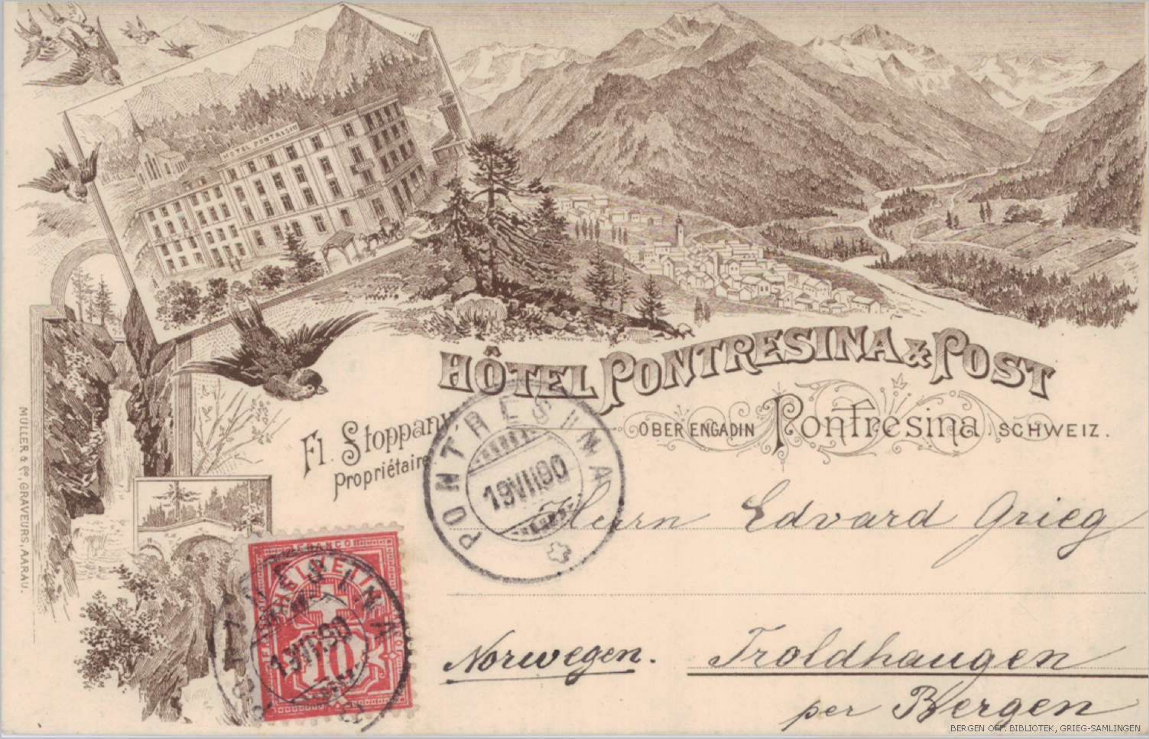 Ansichtskarte des Verlegers Max Abraham an Edvard Grieg, versandt aus Pontresina